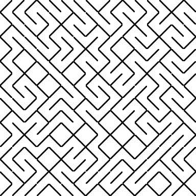 Random labyrinth using Truchet tiling with sentry of Jo